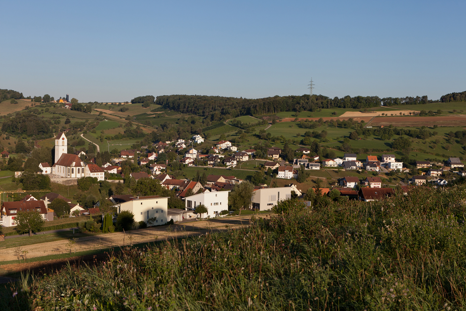 Herznach (AG)